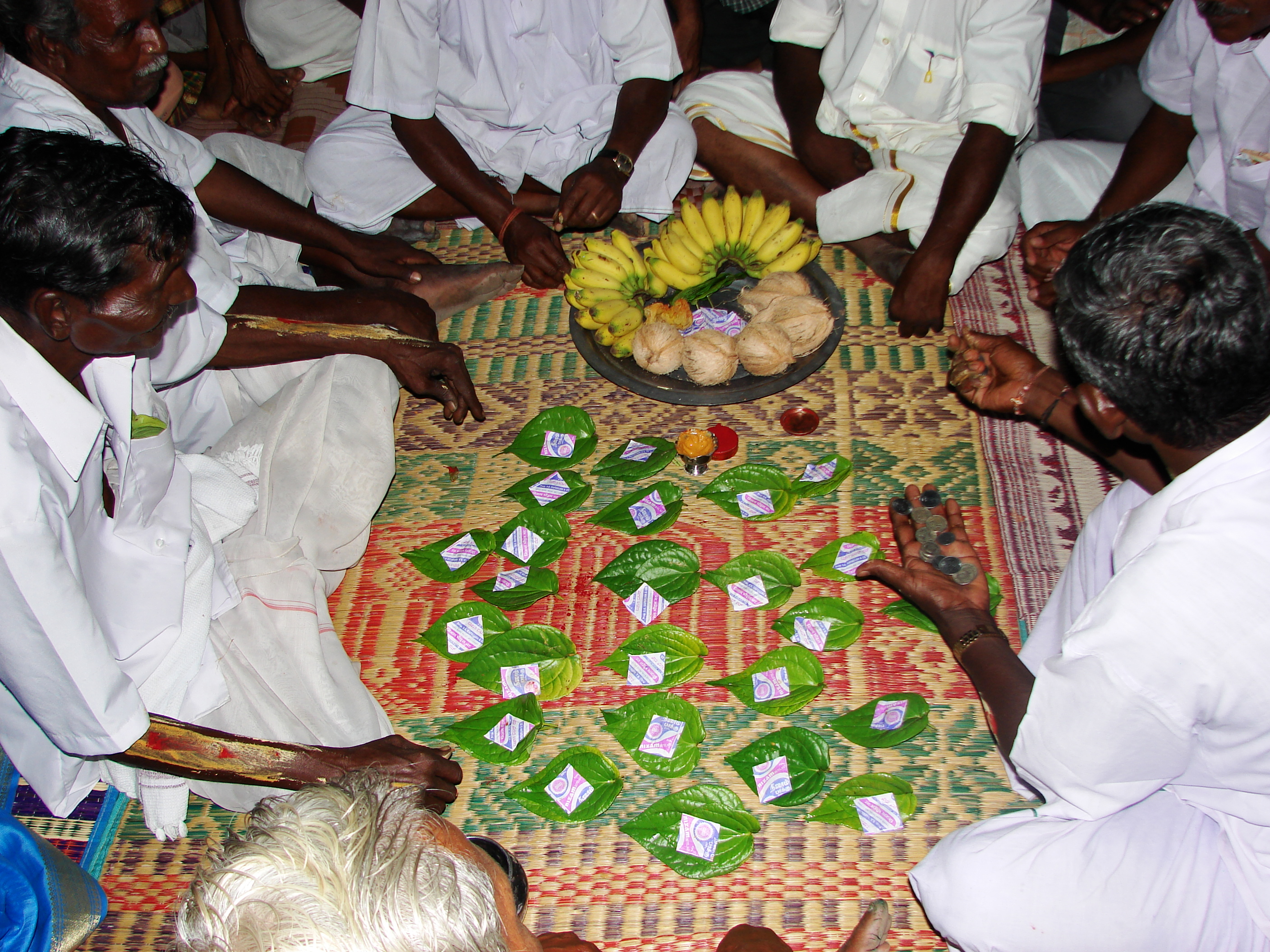 தமிழ்நாட்டின் கொங்கு மண்டலத்தில் நடக்கும் திருமண நிச்சயதார்த்தத்தில் நடக்கும் சடங்குகள். கொங்கு மண்டலத்தின் ஒவ்வொரு நாட்டிற்கும் ஒரு வெற்றிலை பாக்கு வைக்கப்பட்டுள்ளது (24 நாடுகள்).